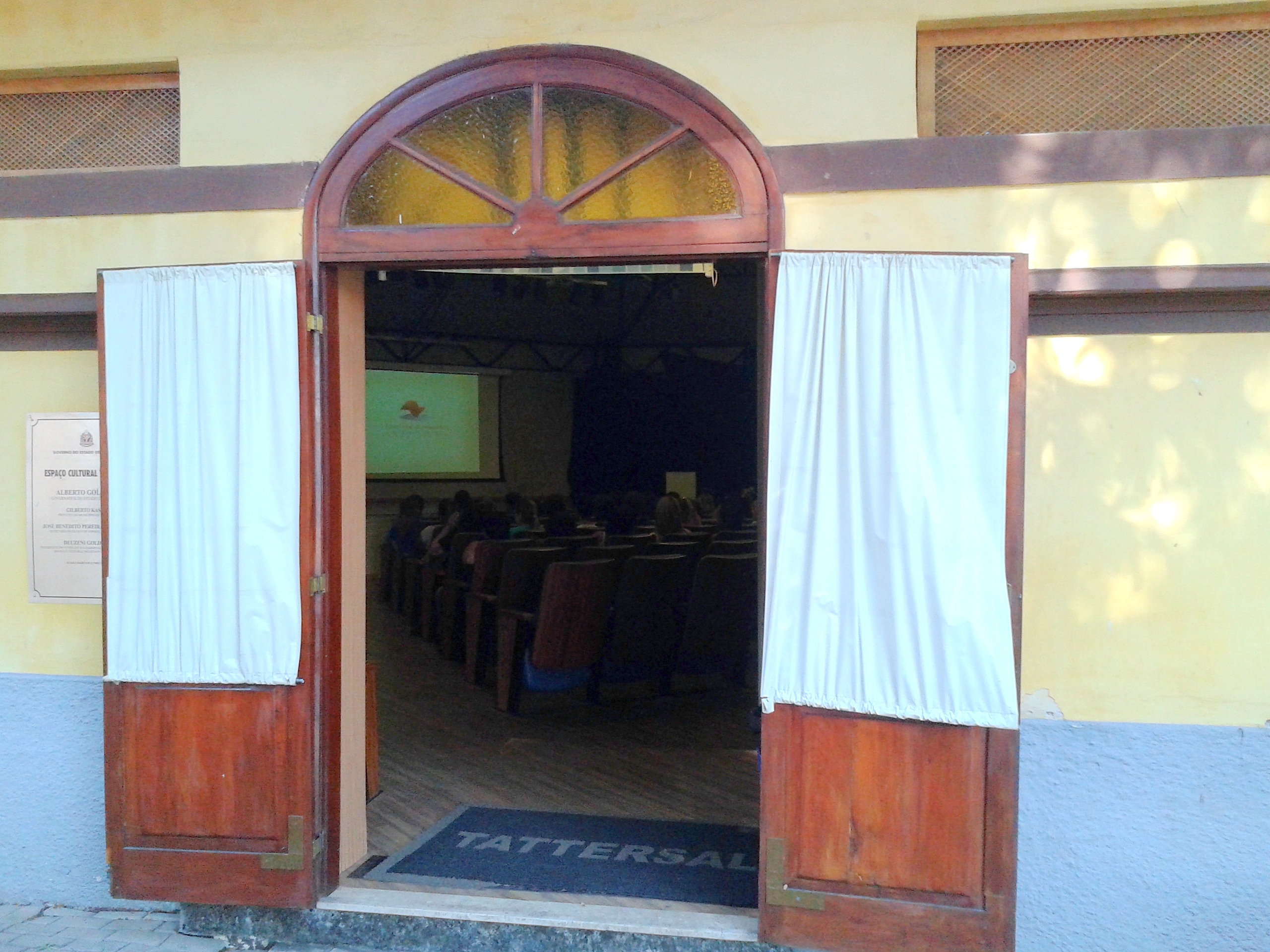 Espaço Cultural Tattersal, no interior do Parque da Água Branca. São Paulo, SP, Brasil.